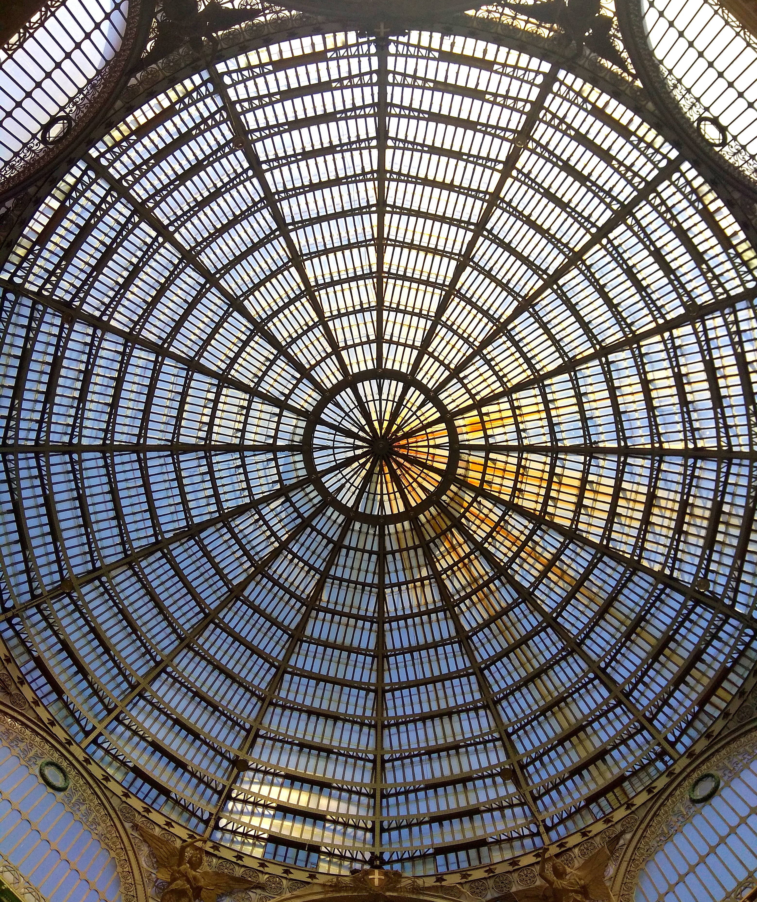 Cupola della Galleria Umberto I vista dall'interno